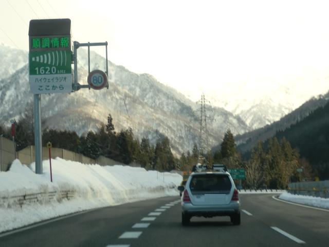 ハイウェイラジオここから（4代目 新潟県湯沢町の関越道で撮影）